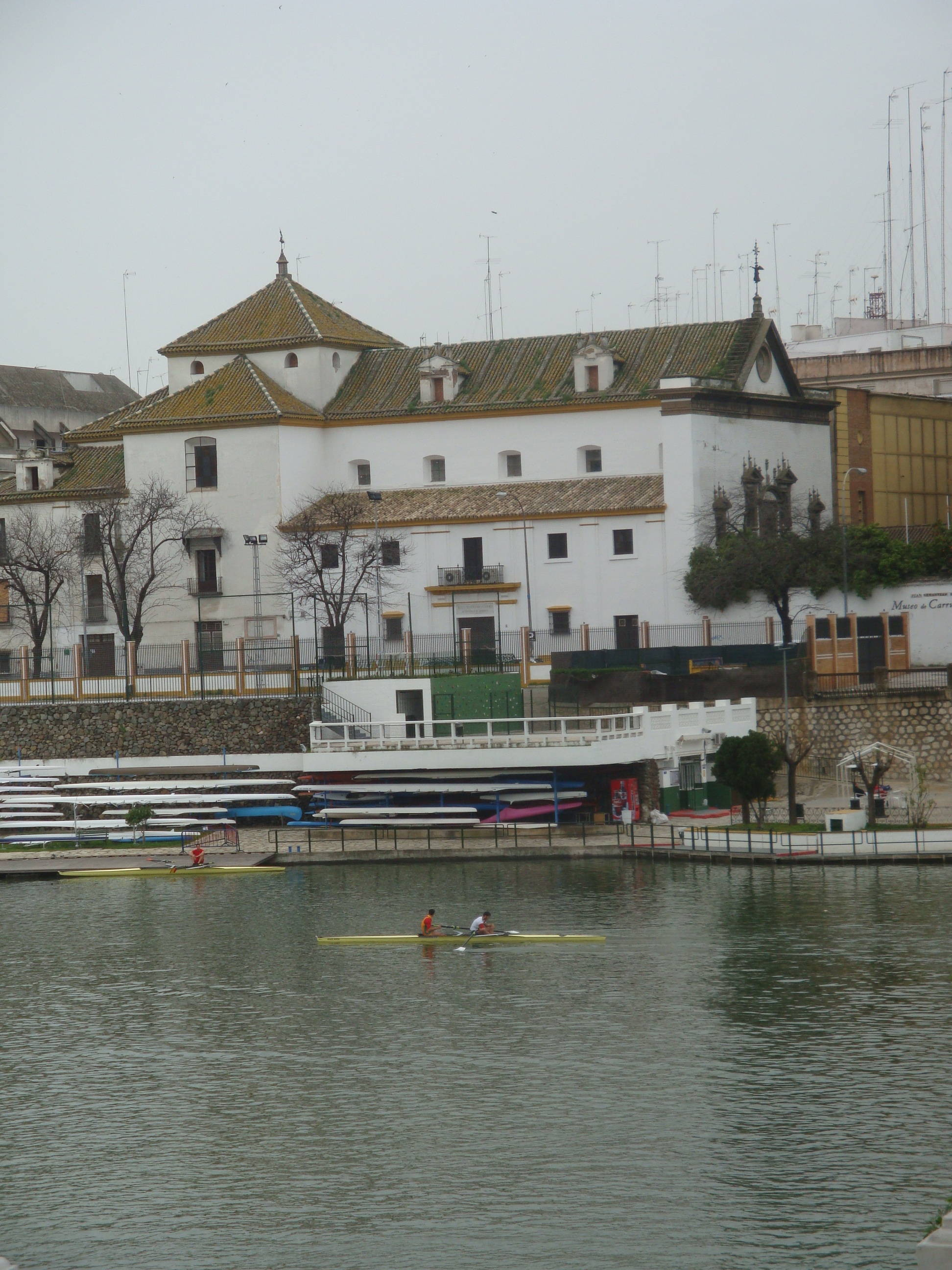 Museo de carruajes. Barrio Los Remedios. Sevilla.